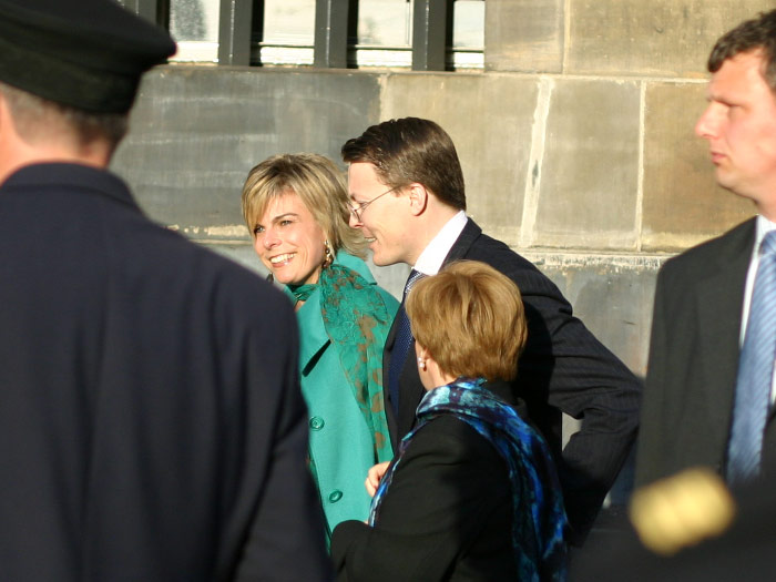 Prins Constantijn der Nederlanden and wife Laurentien Brinkhorst